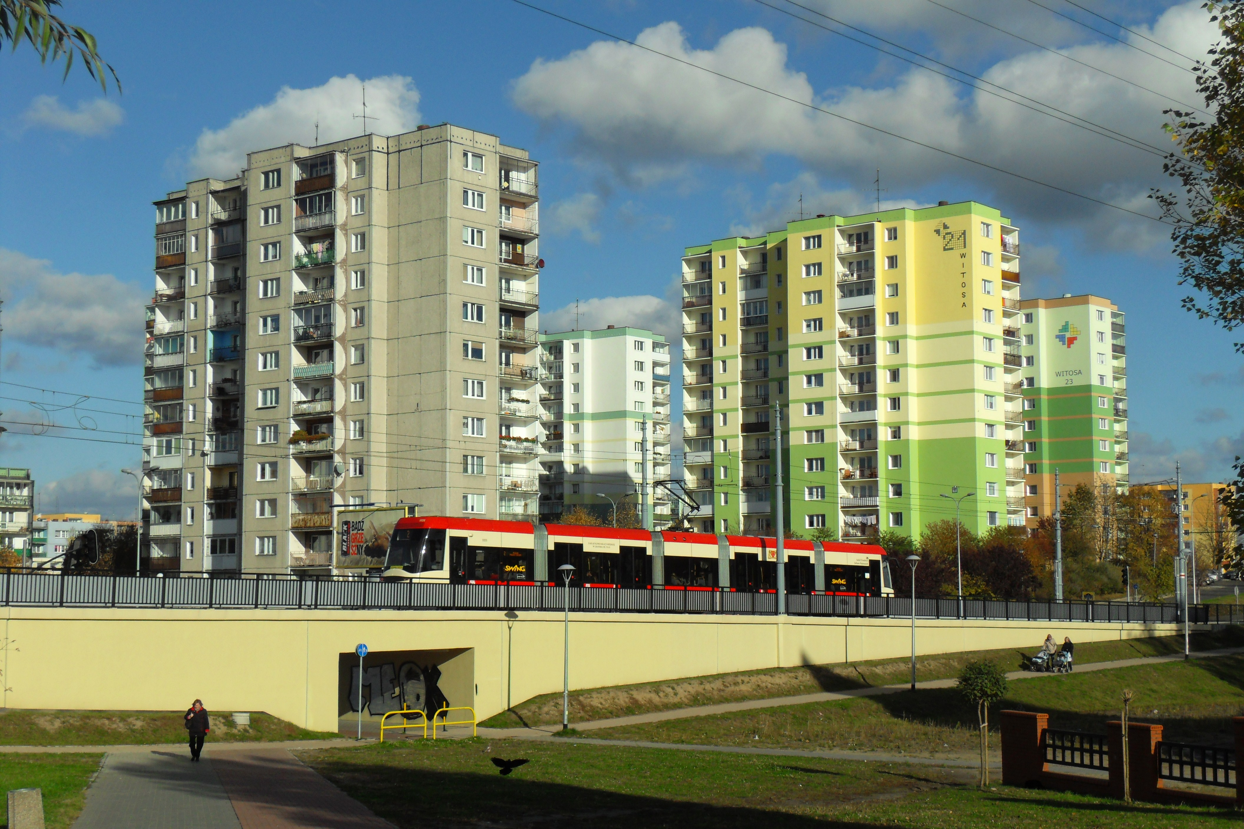 Gdańsk Chełm, ul. Witosa 19 i 21.